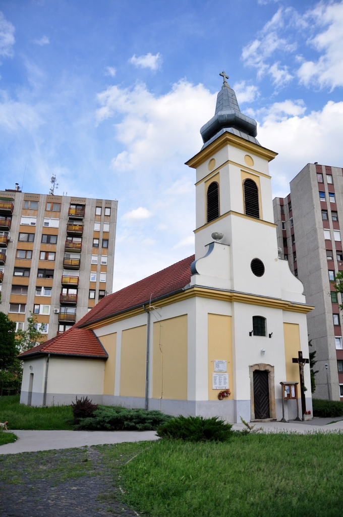 Szentháromság-templom, Rákospalota, Budapest